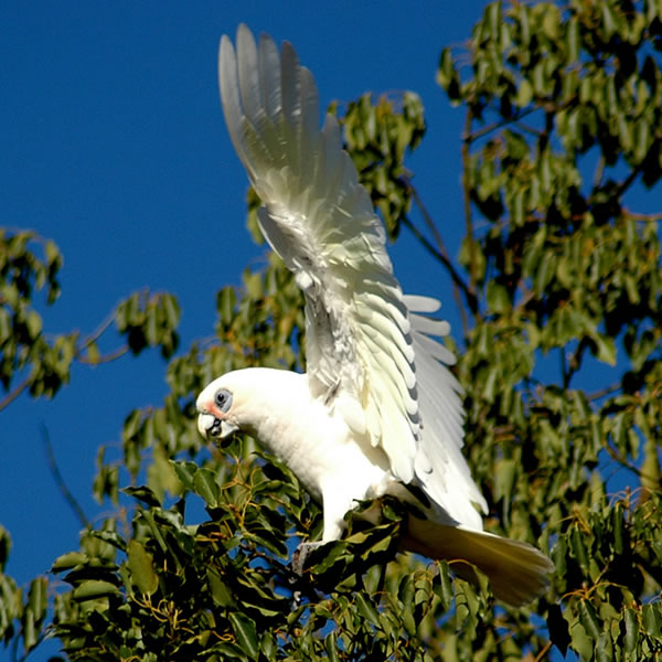 Bird, Little Corella, Cacatua sanguinea